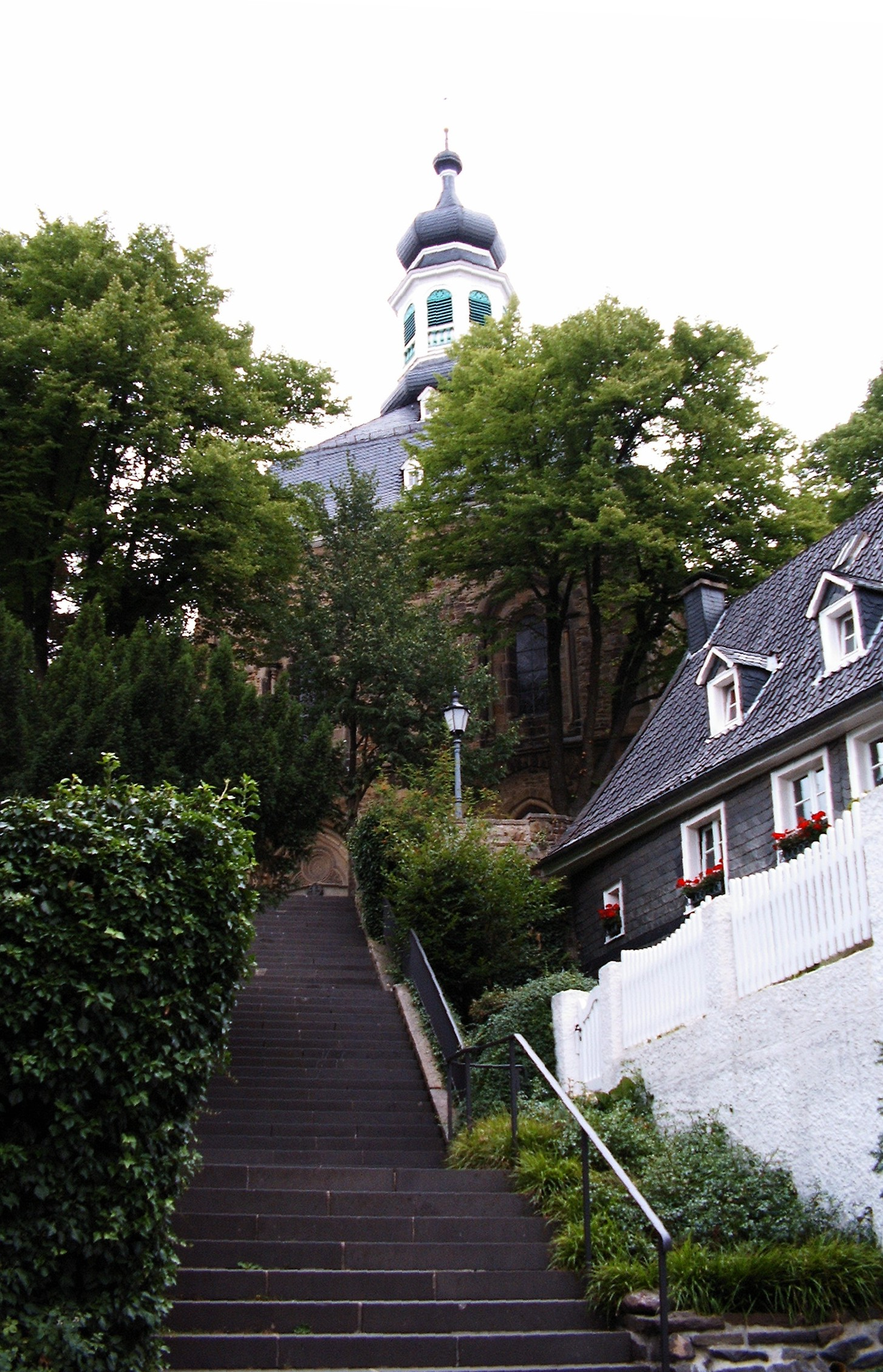 Kirchtreppe am Gräfrather Markt